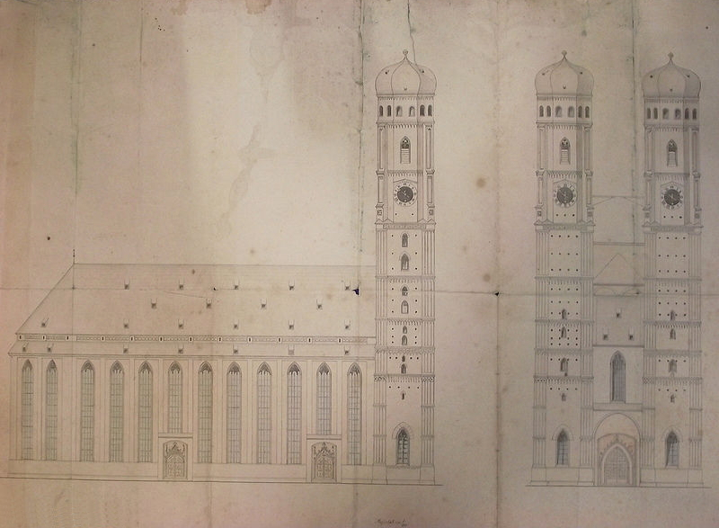 Längsriss von Norden und Frontalriss von Westen der Münchener Frauenkirche